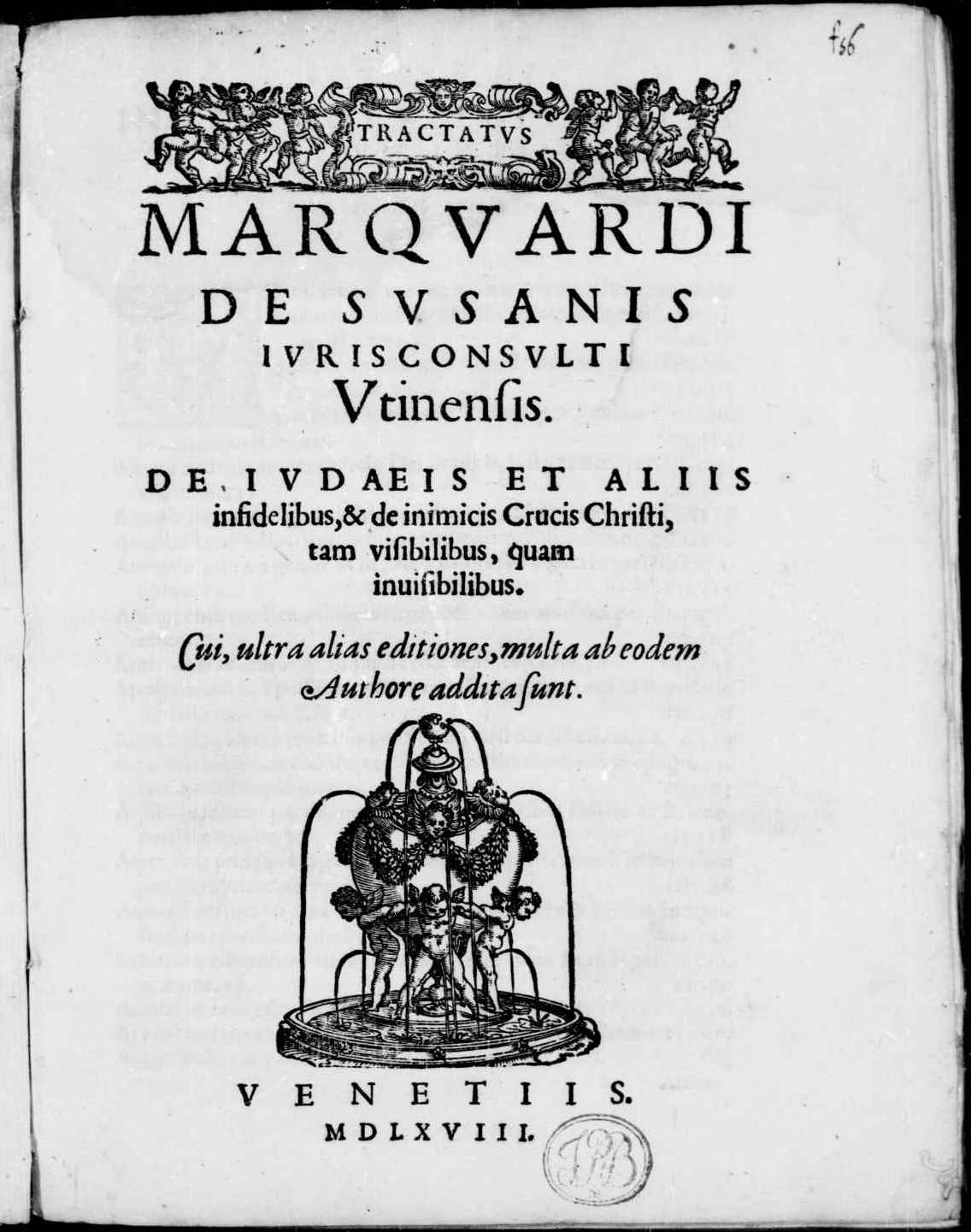 Frontespizio